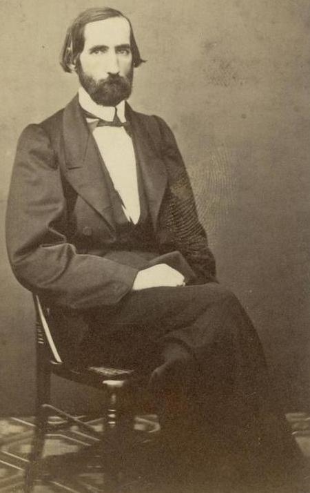 Miguel Luis Amunategui Aldunate